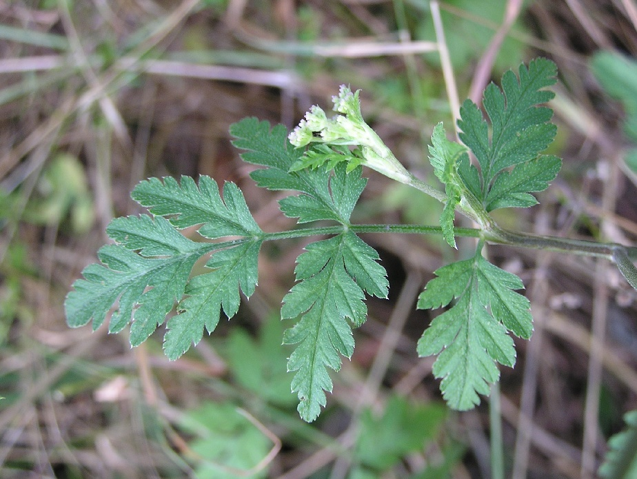 Torilis arvensis auf einer Wiese am Waldrand bei Bad Dürkheim a.d.W. (Deutschland).